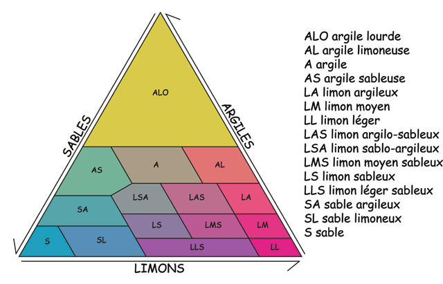 FR:Description Diagramme triangulaire de classification des textures pédologiques Artiste: Henri-Georges NATON Source: importé par le l'Artiste Licence: GFDL-self